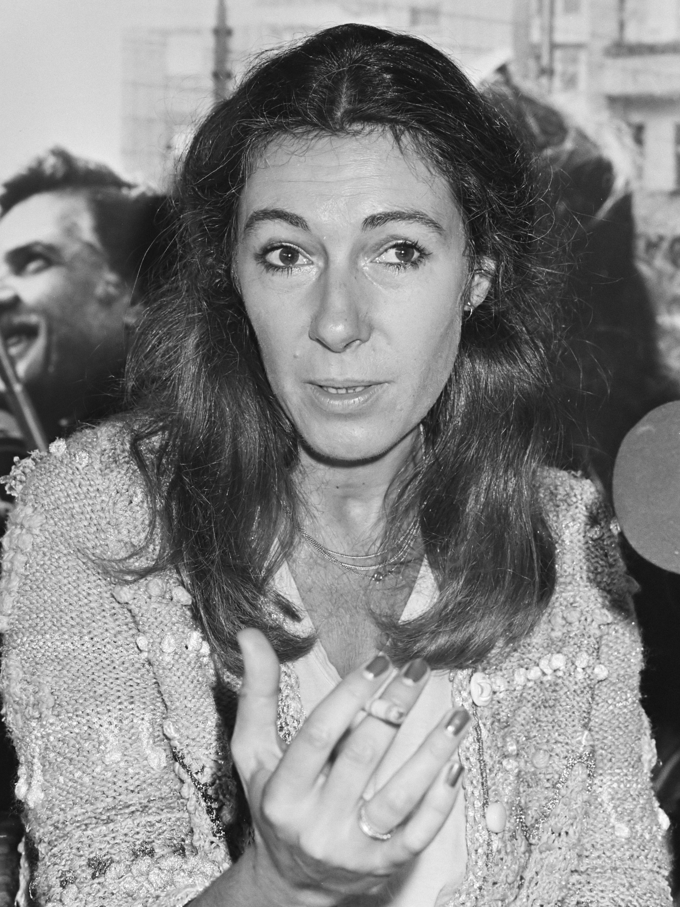 Persvoorstelling in het City Theater in Amsterdam van de film "Malou" van regisseuse Jeanine Meerapfel 28 september 1981